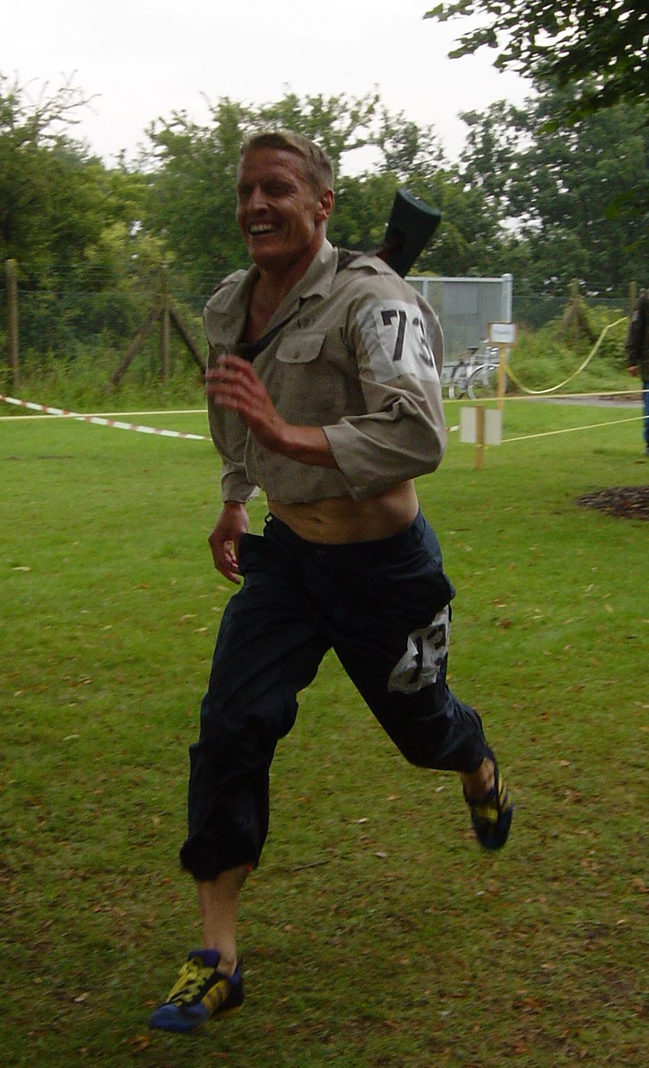 Amfibielöpning i marinfemkamp. Från Eckenförde, Tyskland Em2004.